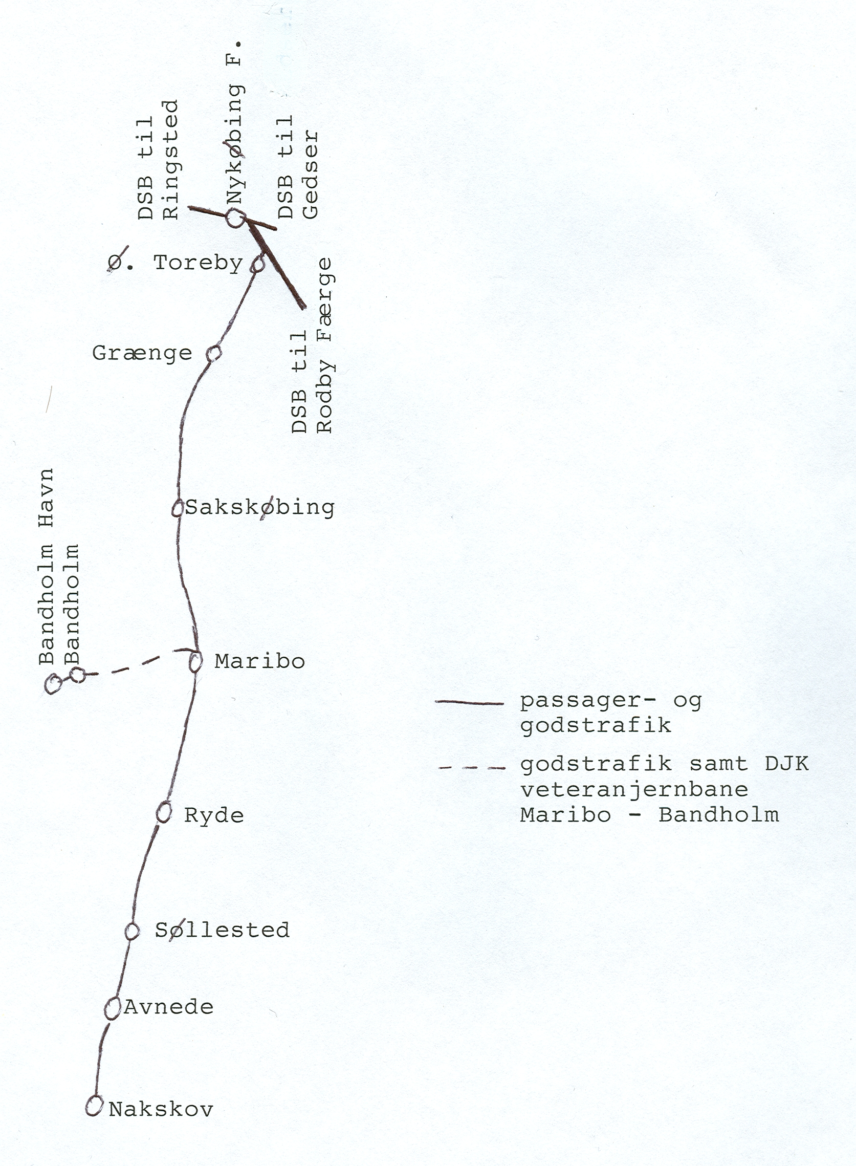 Description: Karte der Lollandsbahn mit der Museumsbahn Maribo - Bandholm. Author: Olaf Just Source: Olaf Just